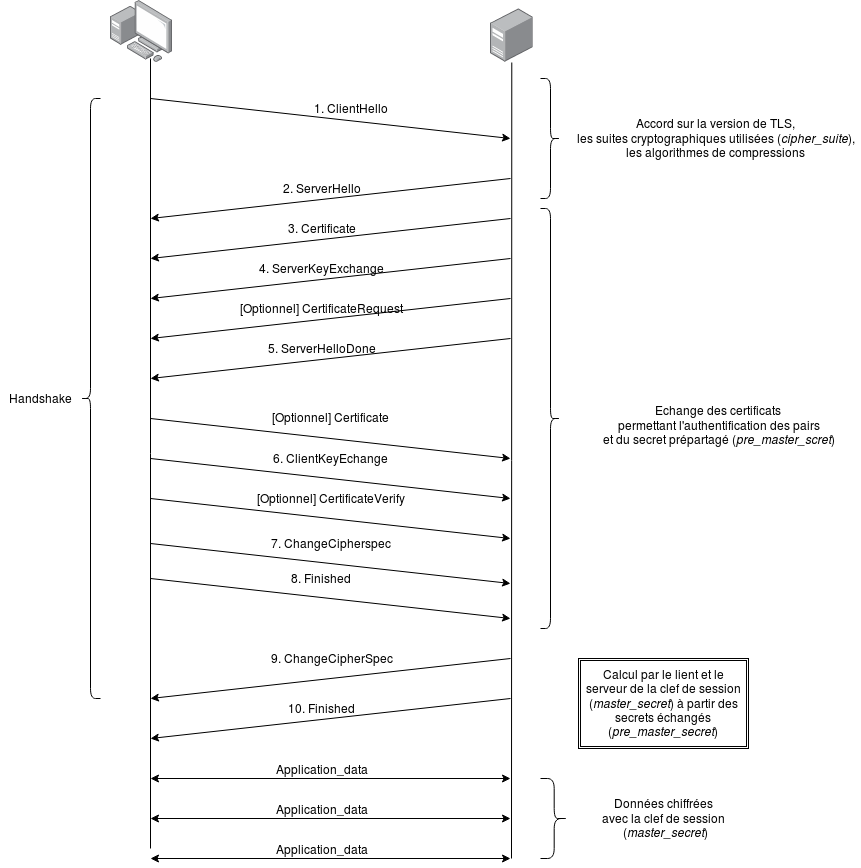 Schéma d'une création de session TLS 1.2 comprenant les records Handhake, ChangeCipherSpec et Application data